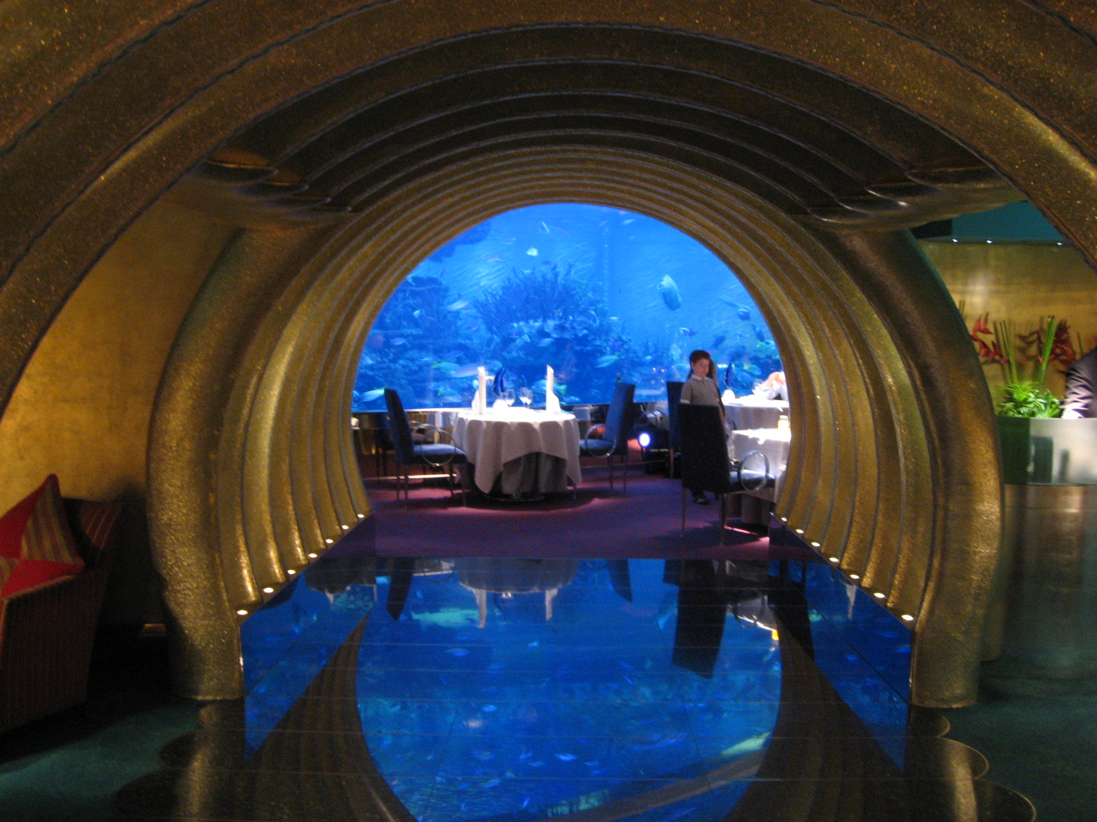 al Mahara restaurant in Burj al Arab